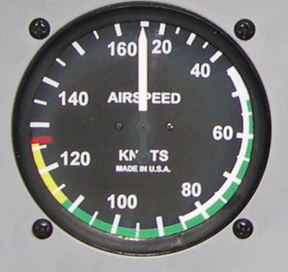 anemomètre